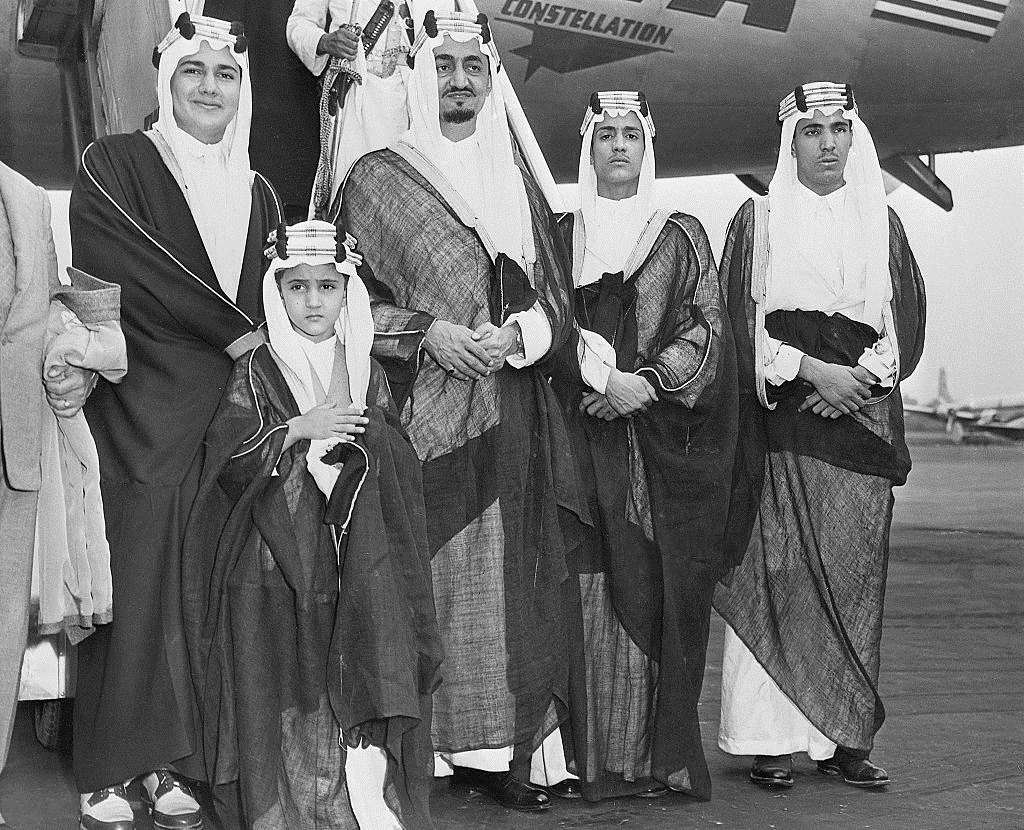 لقطة تظهر الملك فيصل بن عبد العزيز مع عدد من إخوانه وولده سعود الفيصل. من يسار الصورة على الترتيب الأمير طلال بن عبد العزيز والأمير سعود الفيصل و الملك فيصل بن عبد العزيز والأمير عبد الرحمن بن عبد العزيز والأمير عبد المحسن بن عبد العزيز.